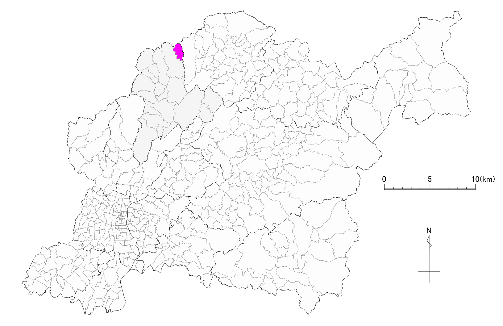 豊田市大岩町位置図